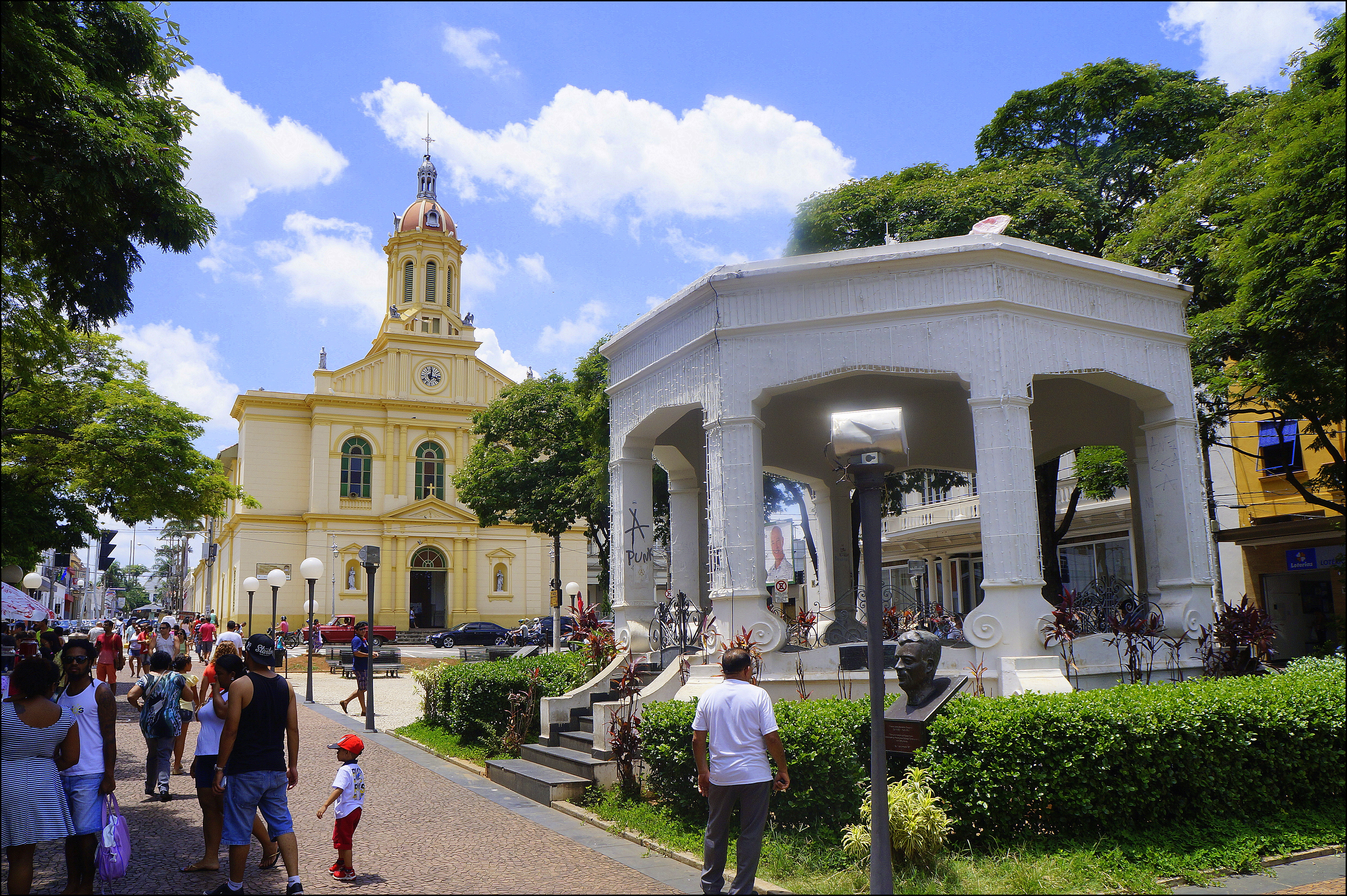 Itu - SP